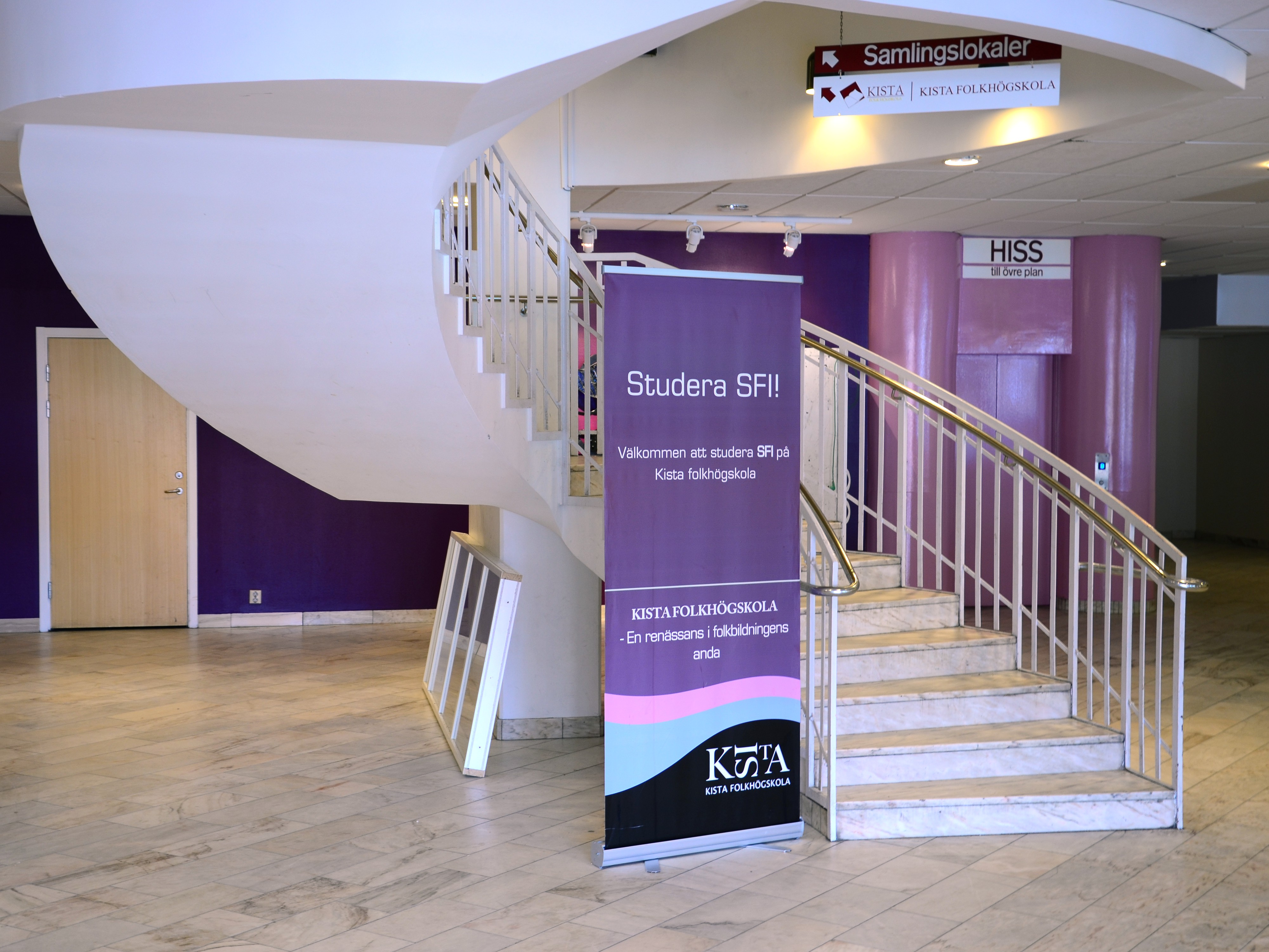 Kista folkhögskola i Kista, Norra Stockholm.